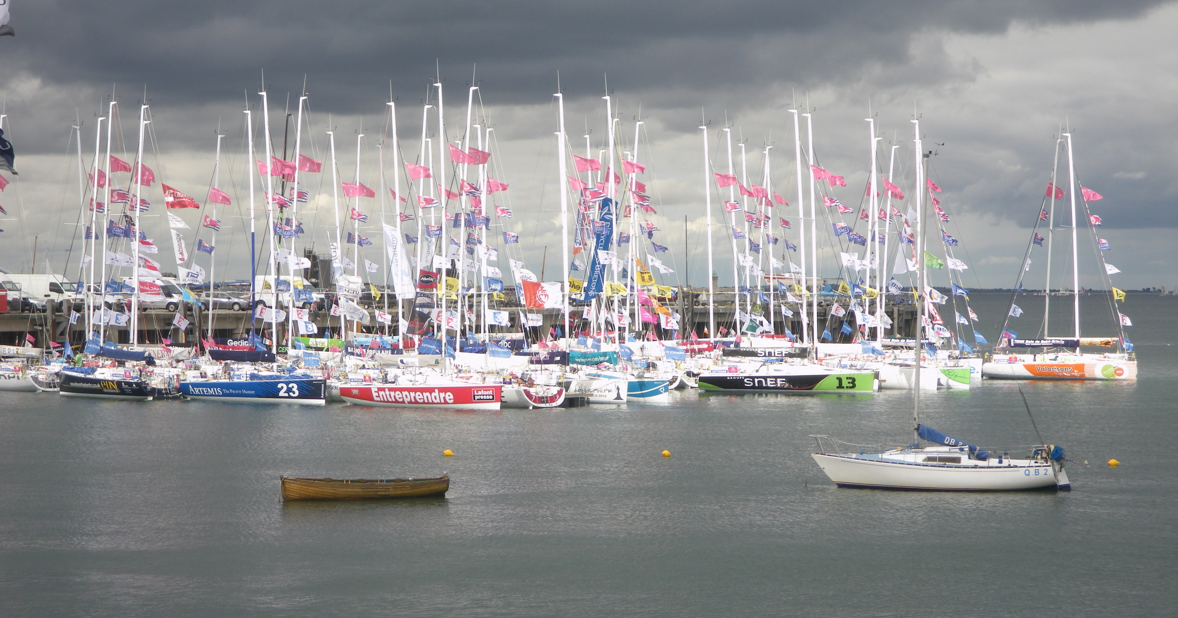 Flotte de la Solitaire du Figaro 2011 à Dún Laoghaire